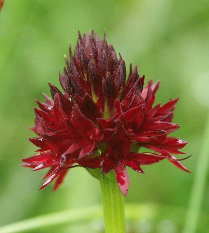 Nigritella rhellicani, Tannheimer Berge, Austria